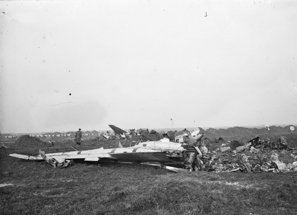 1946年11月14日、PH-TBWはアムステルダムで墜落事故を起こし、26人が死亡した。